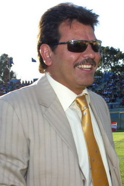 EVE v O'HI